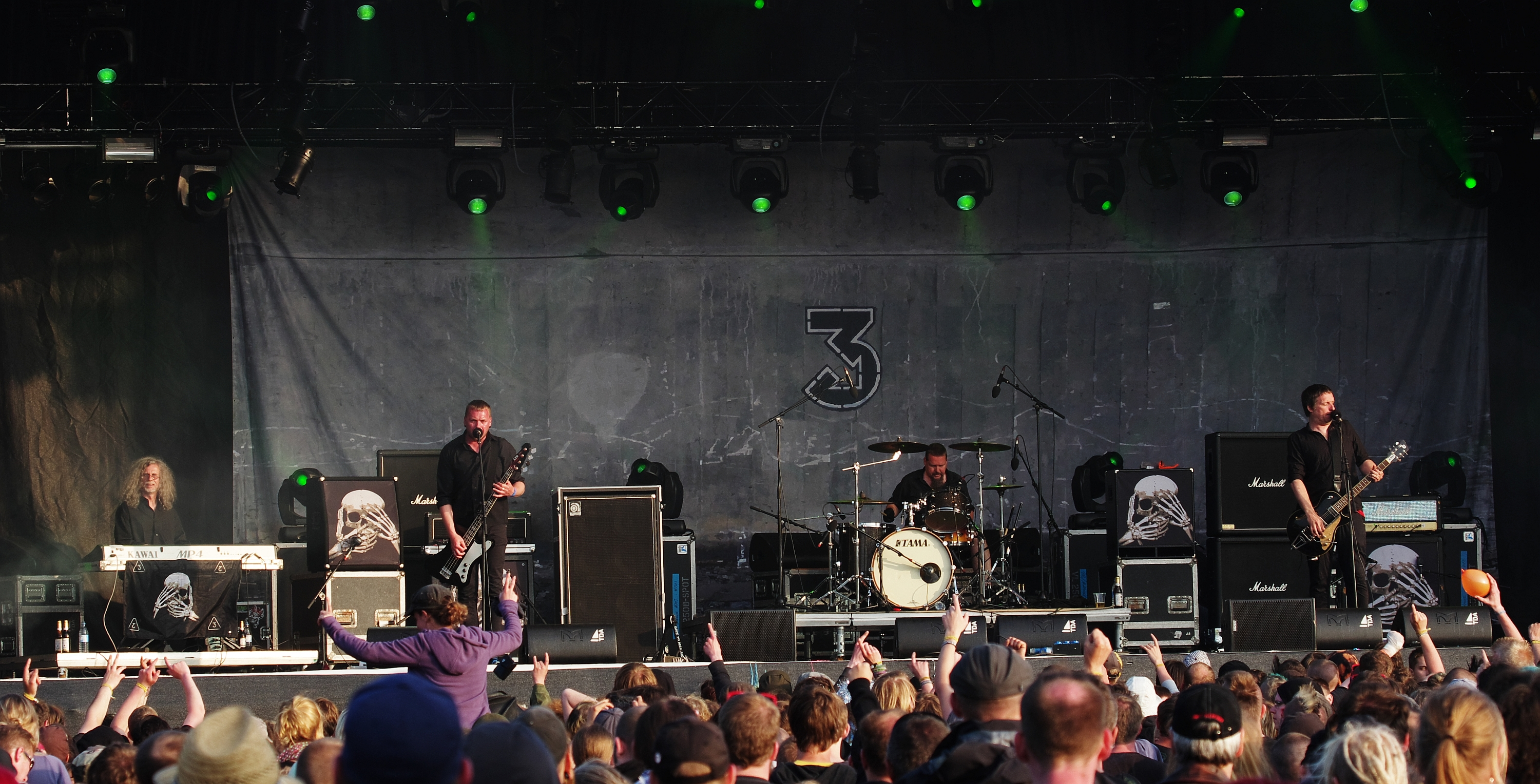 Dritte Wahl beim Ruhrpott Rodeo 2013. Besetzung: Gunnar (Gitarre & Gesang); Stefan (Bass & Gesang); Krel (Schlagzeug); Rainer Langhans als Gast (Keyboards)